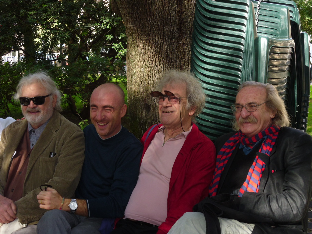 Paul Polansky, Leonardo Omar Onida, Beppe Costa e Jack Hirschman ai giardini pubblici di Sassari